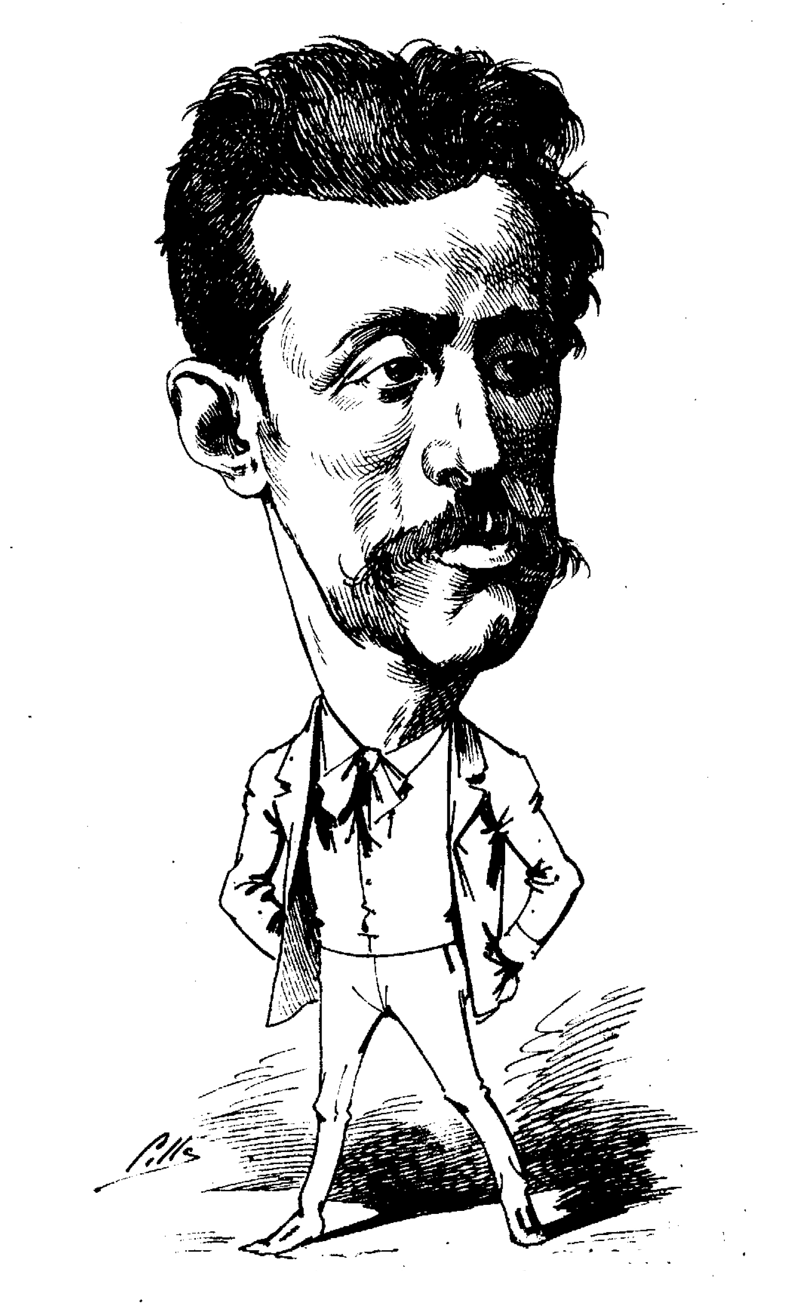 José Zahonero.